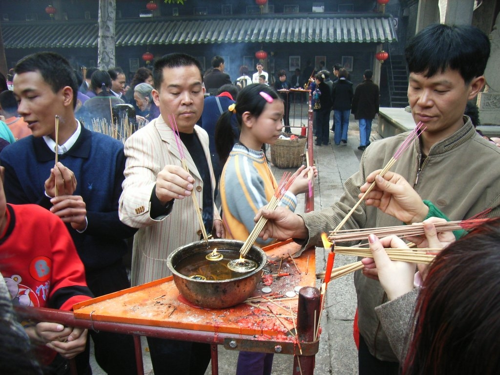 佛山祖廟建築群位於zh:祖廟路二十一號zh:佛山市博物館內，由祖廟、孔廟、碑廊、陳列館和園林組成，與zh:黃飛鴻紀念館相通,占地 18600平方米，在1985年8月27日立之為全國重點文物保護單位